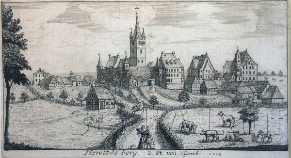 Ansicht der Marktgemeinde Heroldsberg mit Wehrkirche St. Matthäus um 1708 in einer Radierung von J.A. Boener